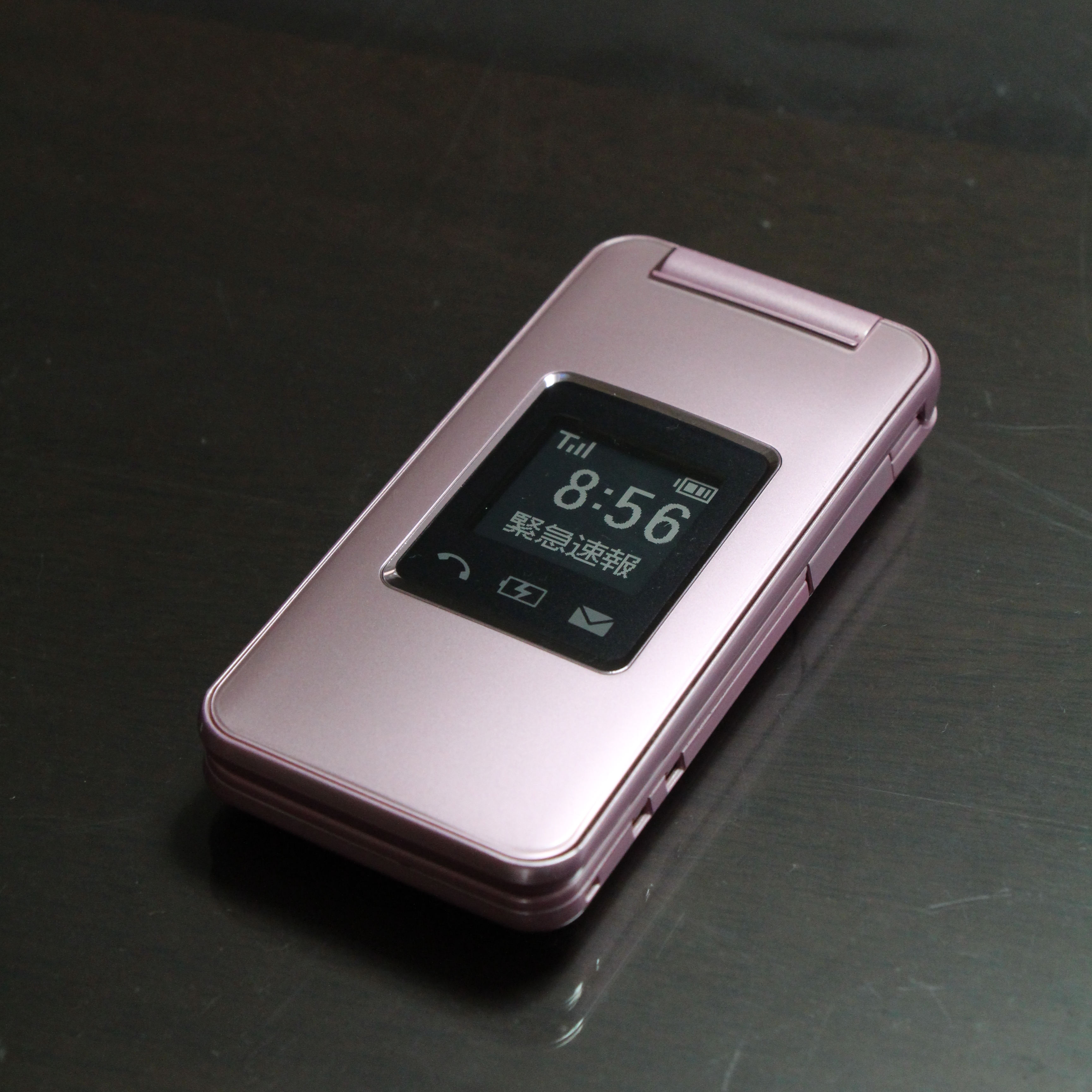 かんたん携帯 108SH ピンクの外観写真。 平成29年6月25日07時02分頃の長野県南部の地震に伴って発表された緊急地震速報（警報）を緊急速報メールによって受信した状態。